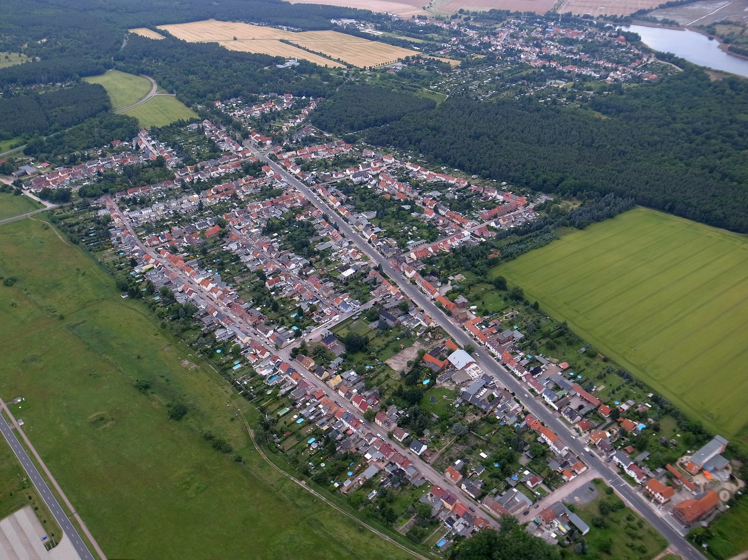 Dessau, Ortsteil Kleinkühnau, im Hintergrund Großkühnau